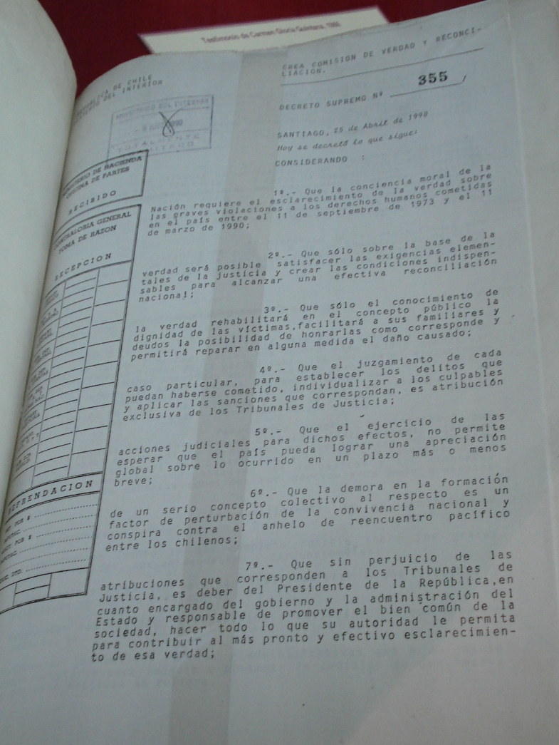 Decreto que crea la Comisión Nacional de Verdad y Reconcilición de Chile, por el presidente Patricio Aylwin. Archivo Nacional de Chile.